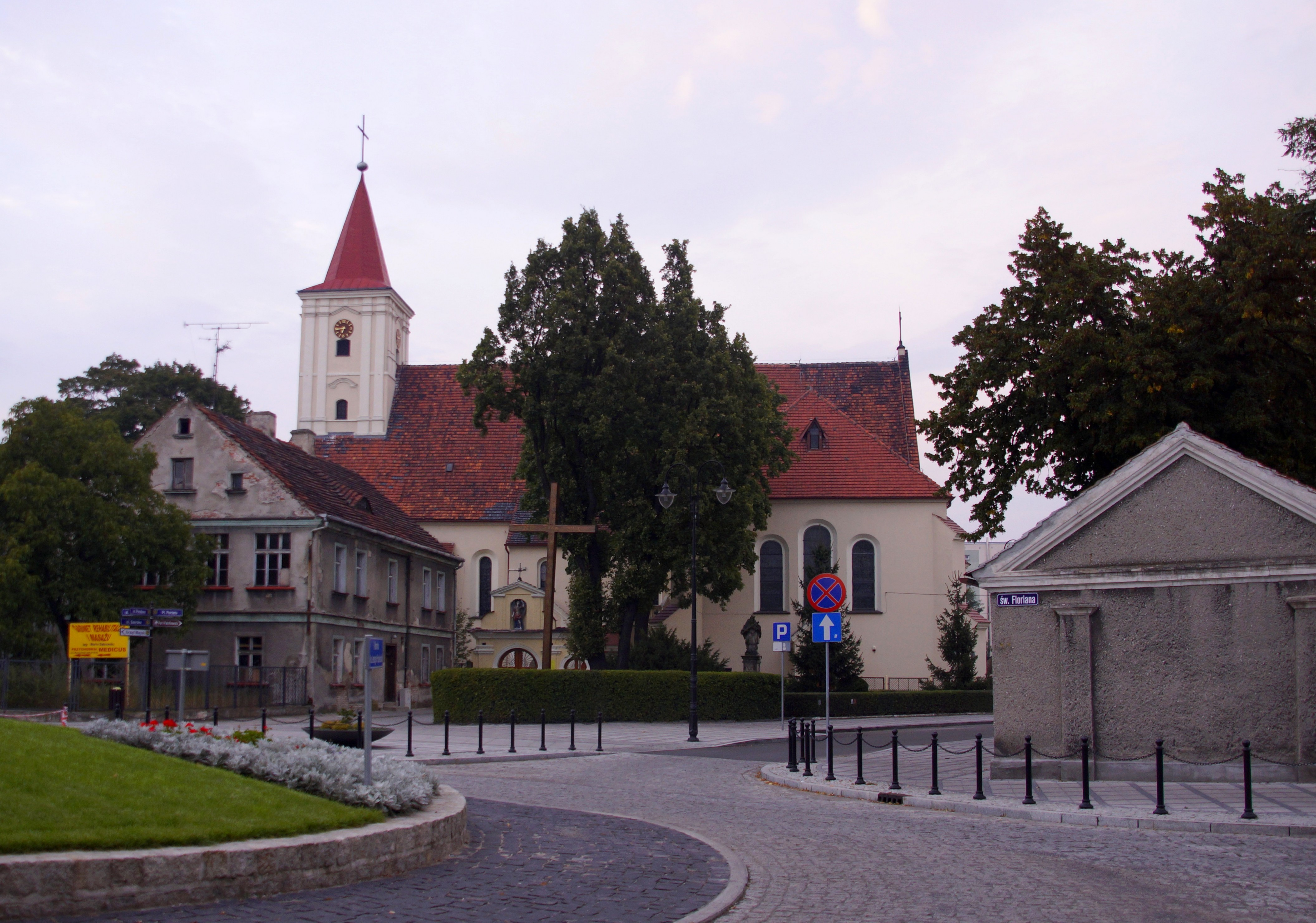 Nowa Sól - dawny kościół ewangelicki, obecnie rzym.-kat. parafialny p.w. św. Michała, mur., 1591-1597, 1878-1880 (zabytek nr 49 z 10.05.1955)